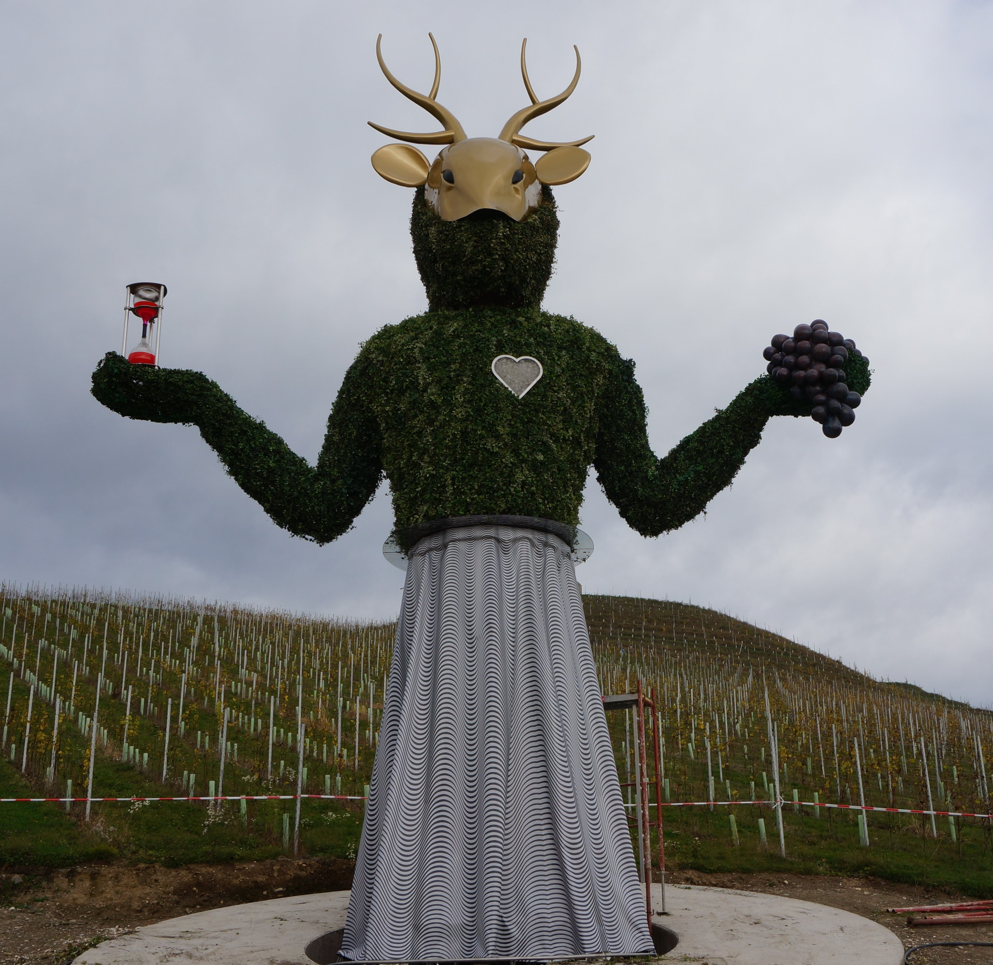 André Heller gestaltete die 15m hohe und mit Efeu umrankte Skulptur "Göttin der Zeit" im Weingut Taggenbrunn in St. Georgen am Längsee für die Bauherren Alfred und Andrea Riedl, Inhaber der Jaques Lemans-GmbH. in St. Veit an der Glan, Kärnten.